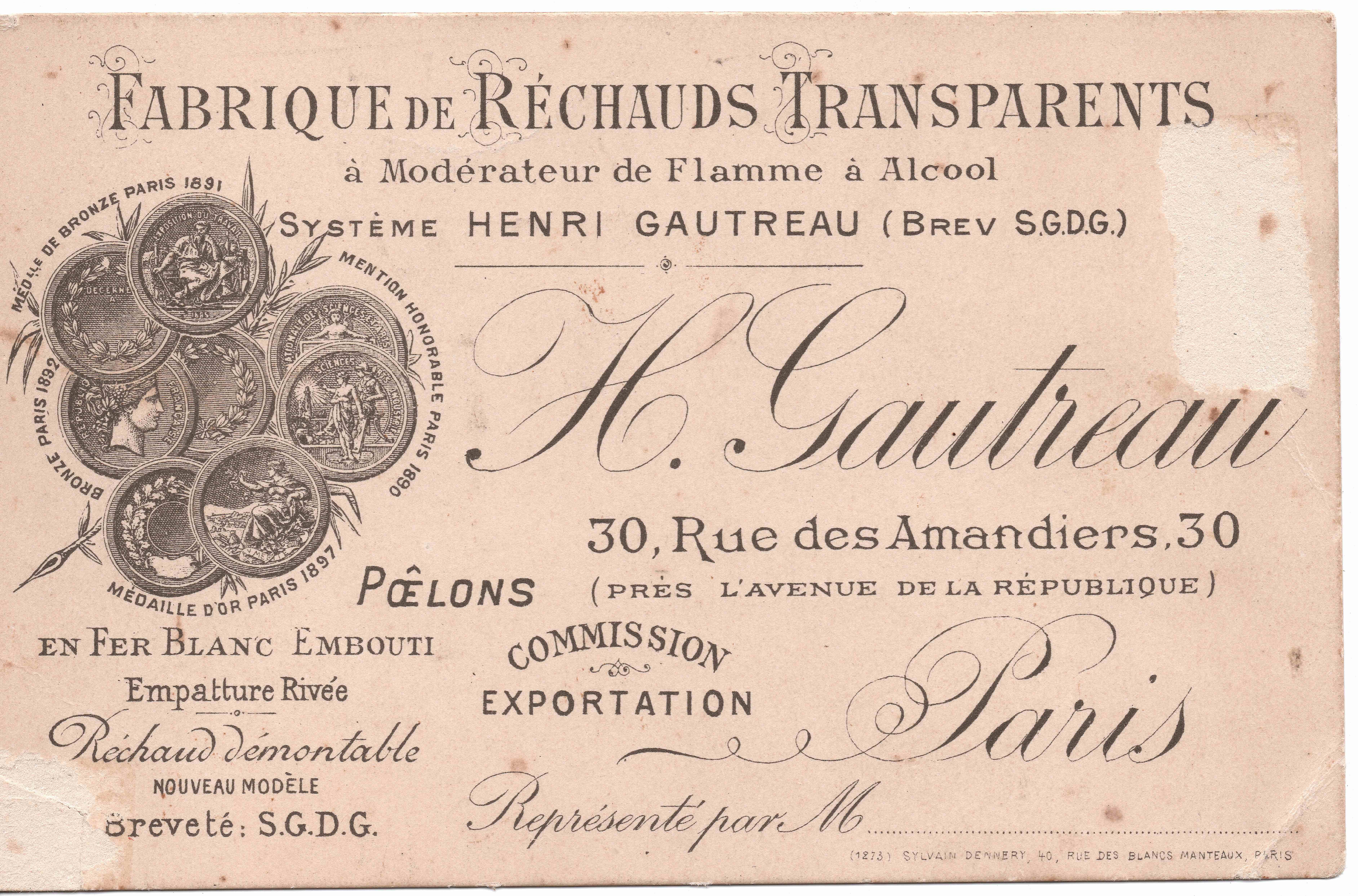 1899 - Carton publicitaire (25x22) du réchaud transparent H.G, affiché aux devantures de boutiques d'articles ménagers. Médaille d'or en 1897 à Paris.